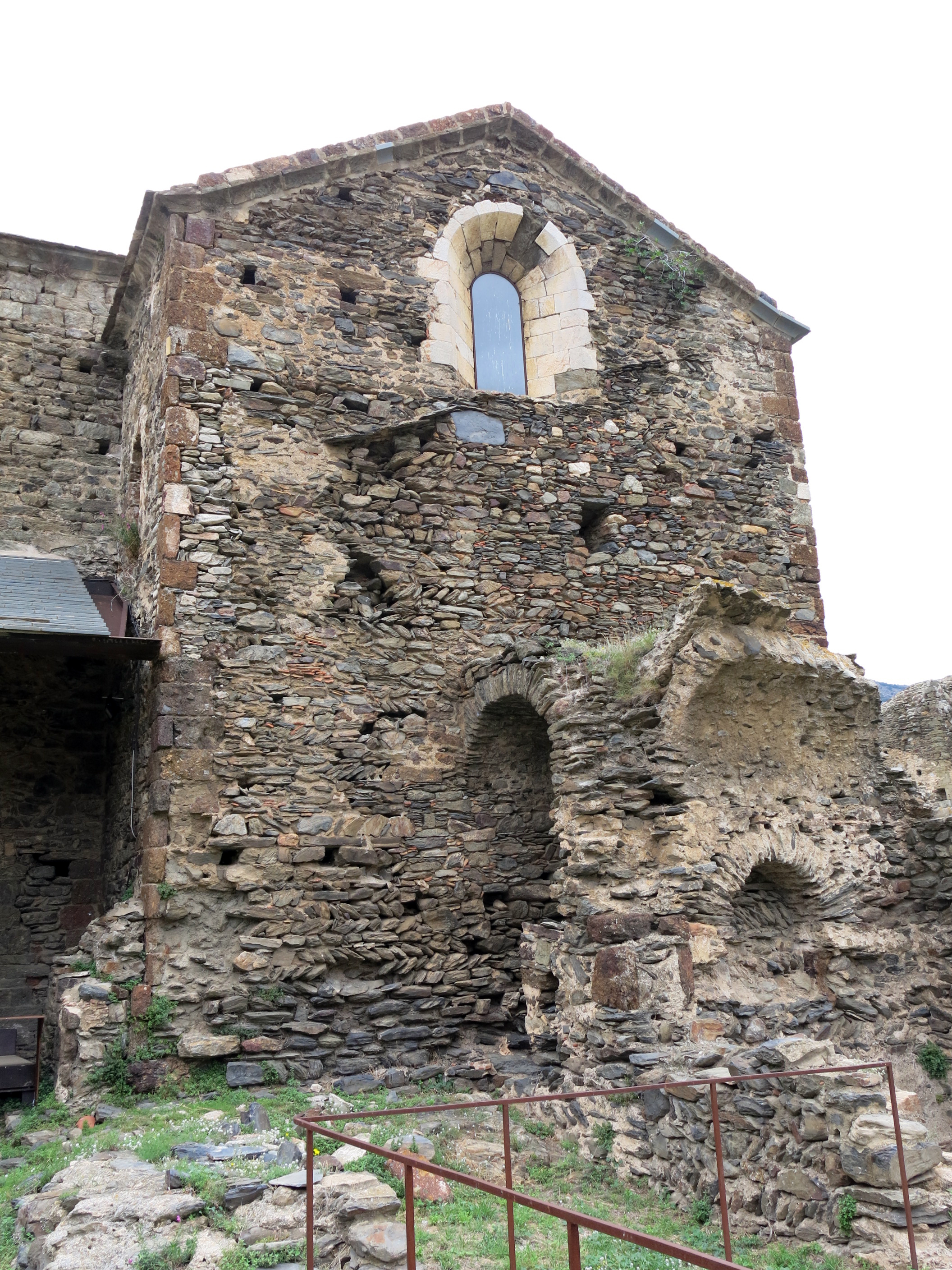 Conjunt monàstic de Sant Quirze de Colera (Rabós)